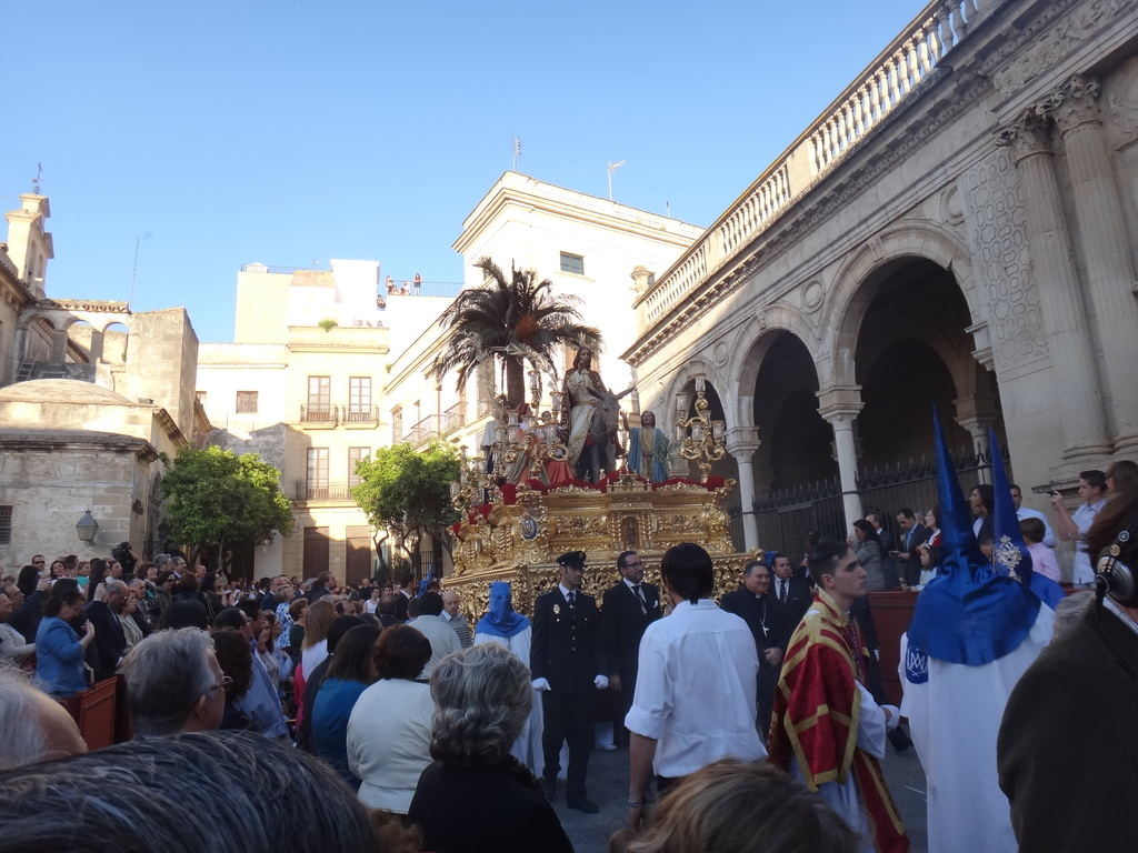 Antiguo Cabildo de Jerez, Jerez de la Frontera (Andalucía, España)